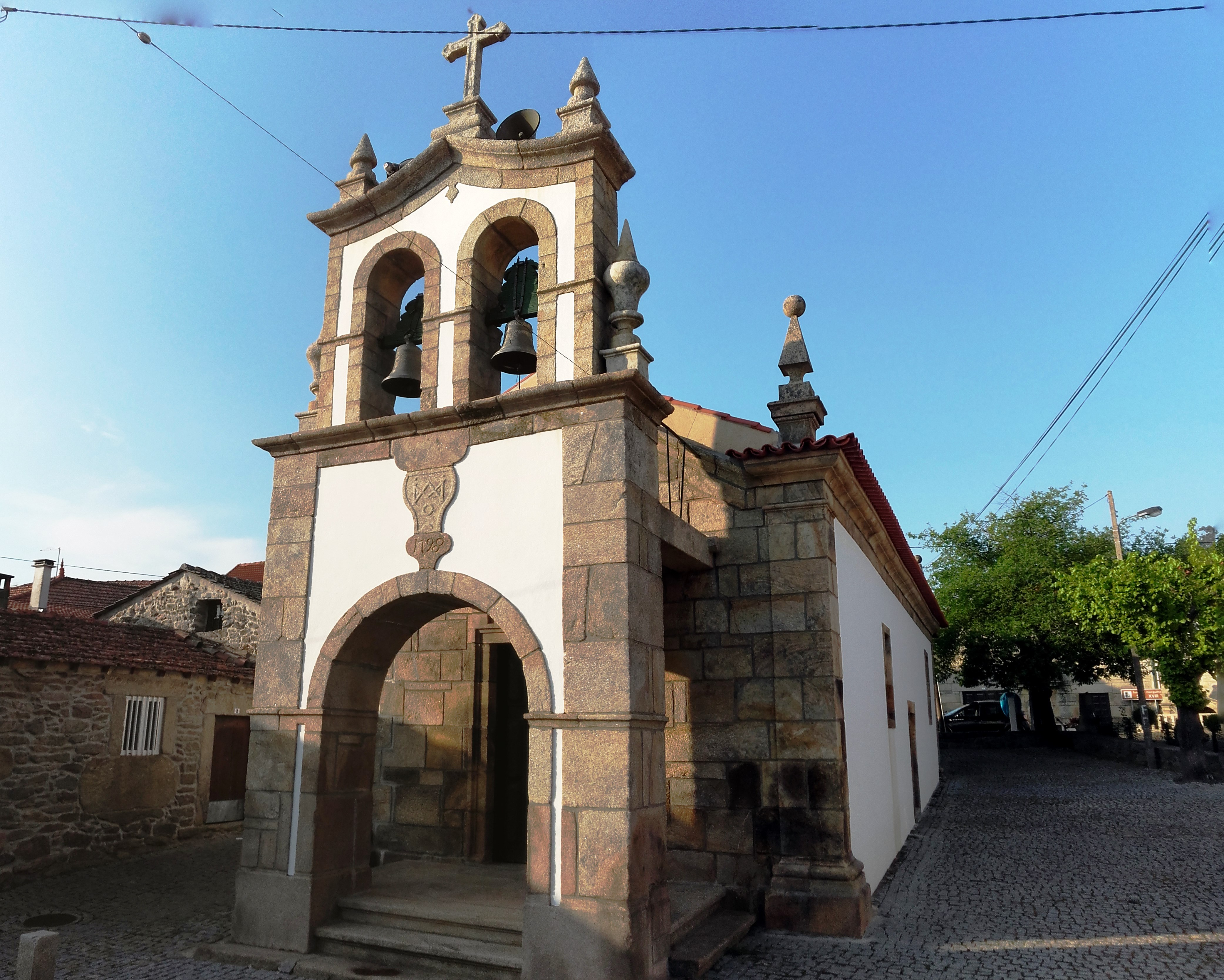 Igreja matriz de Escurquela